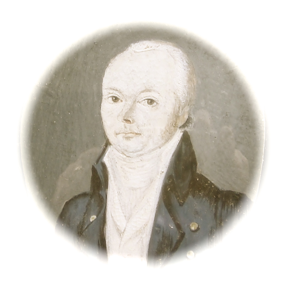 Das Medaillon stammt von seiner Frau Maria Kresenzia Cäcilia geborene Wachsman und ist im Fricktaler Museum Rheinfelden ausgestellt.